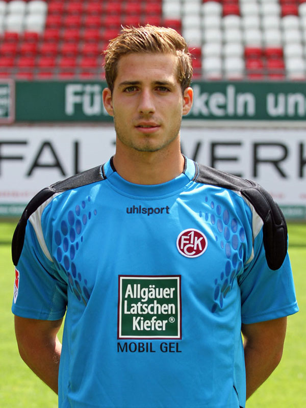 Kevin Trapp, Fußballtorhüter